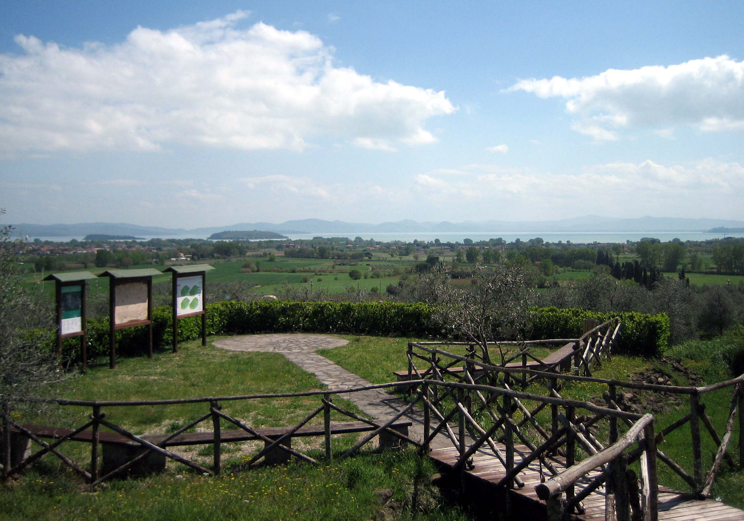 Schlachtfeld am Trasimenischen See